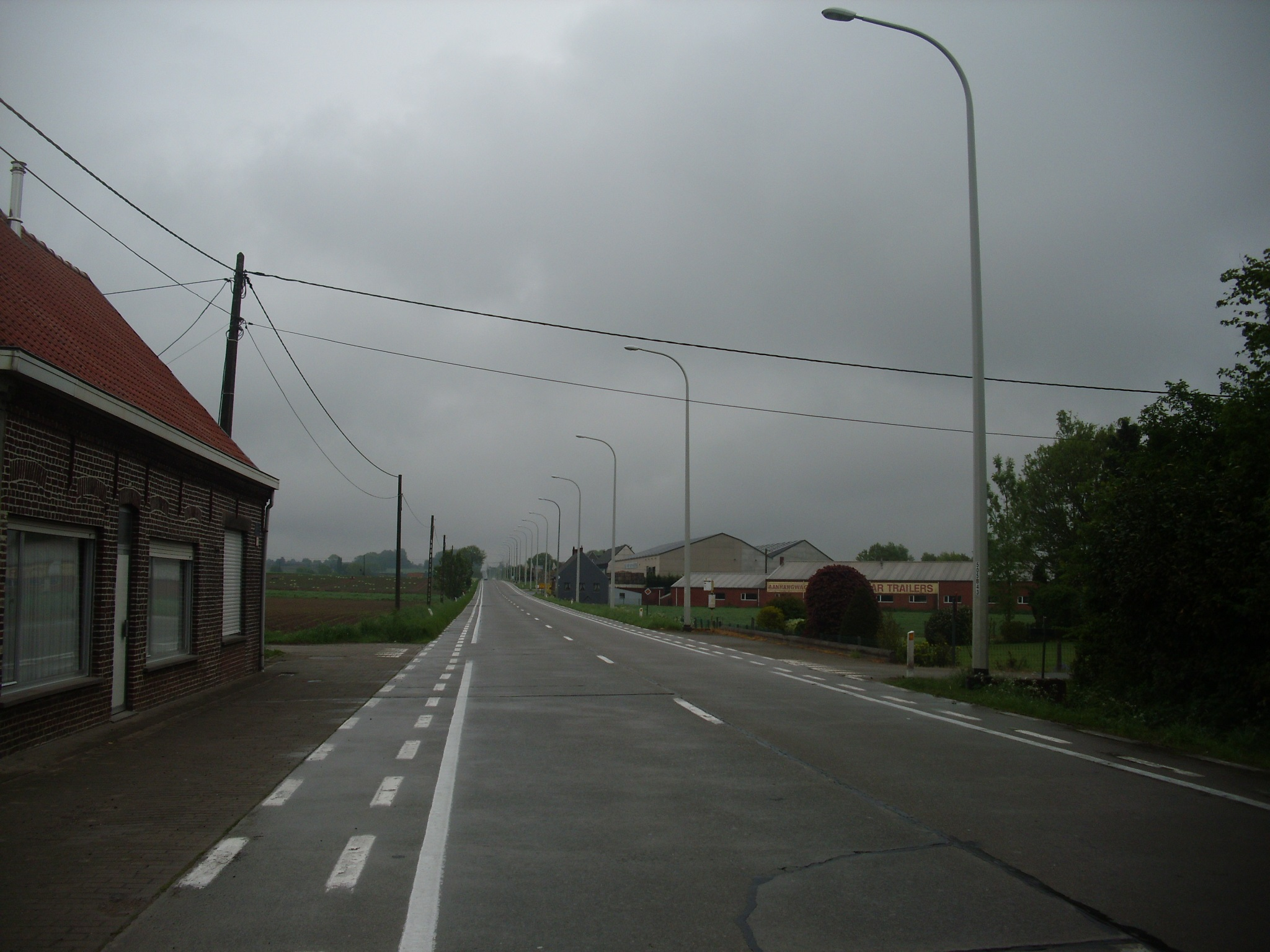 De N35 nabij Aarsele (Tielt) links de Processiestraat - Tielt - West-Vlaanderen - België